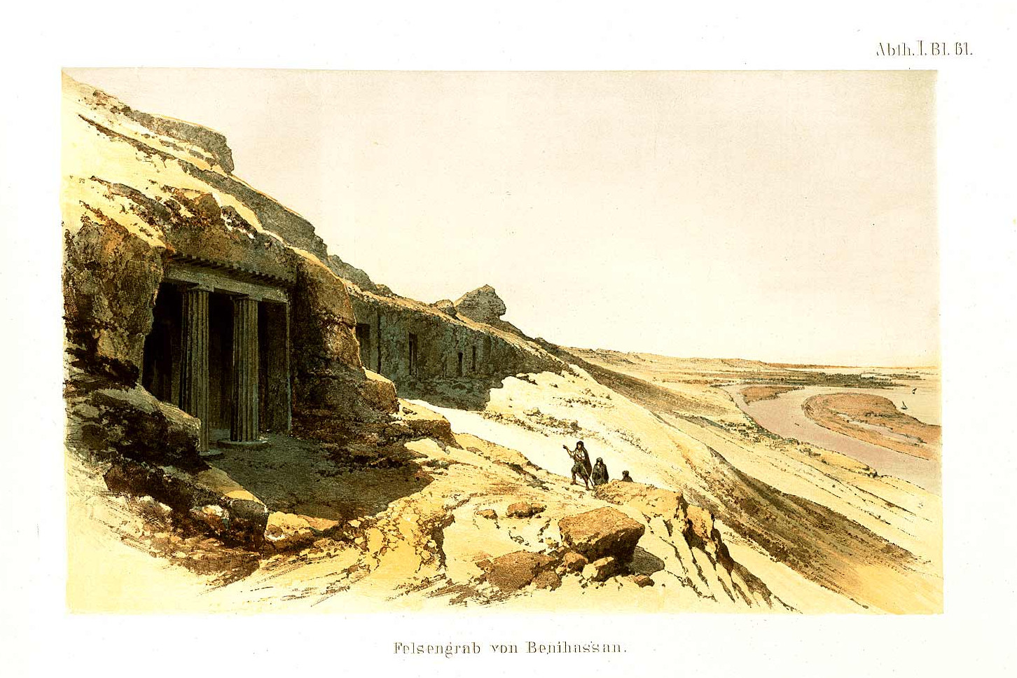 Denkmaeler aus Aegypten und Aethiopien nach den Zeichnungen der von Seiner Majestät dem Koenige von Preussen, Friedrich Wilhelm IV., nach diesen Ländern gesendeten, und in den Jahren 1842–1845 ausgeführten wissenschaftlichen Expedition auf Befehl Seiner Majestät